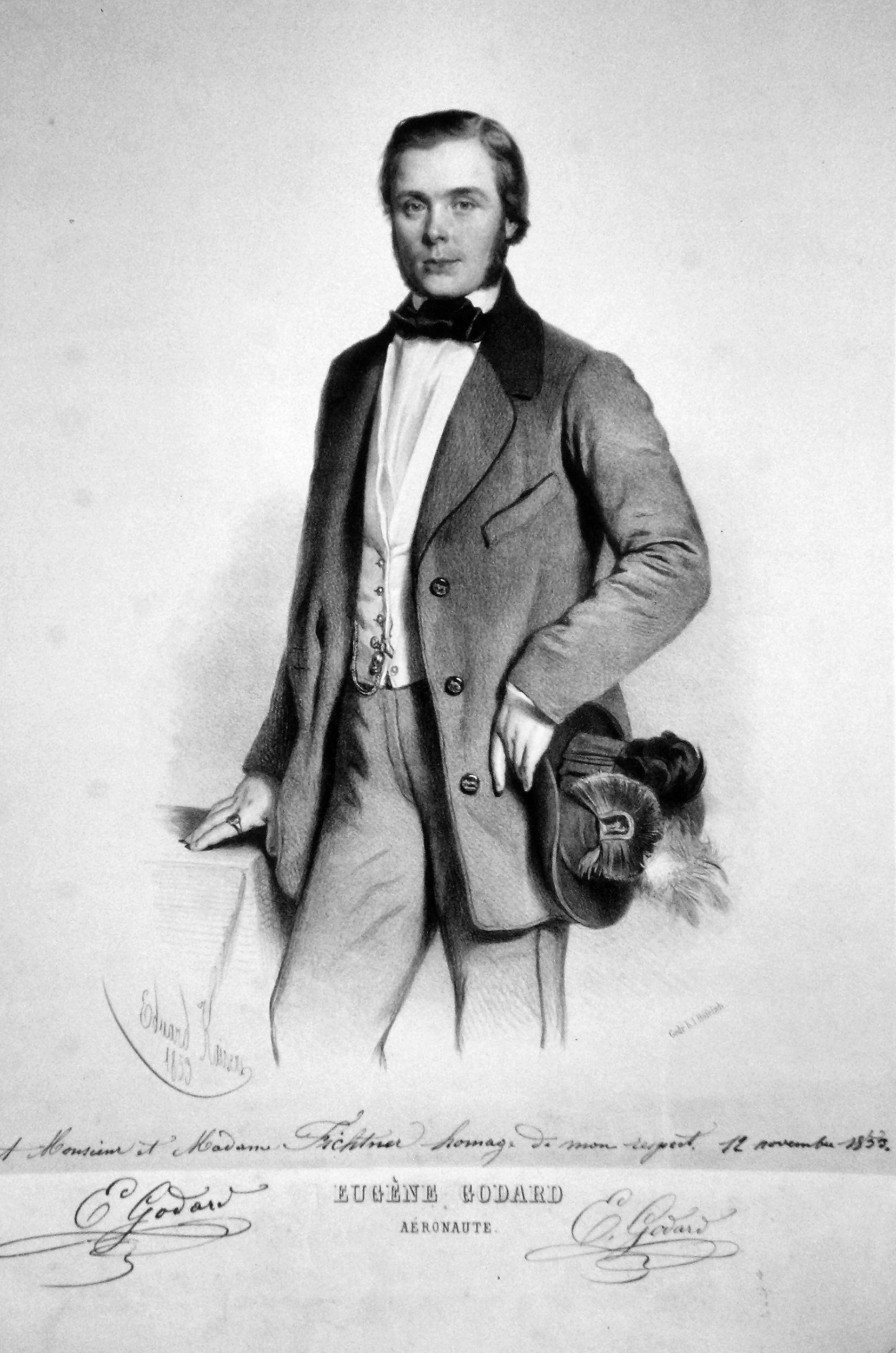 Eugène Godard (1827-1890), französischer Aeronaut, Ballonfahrer und Konstrukteur. Lithographie von Eduard Kaiser, 1851